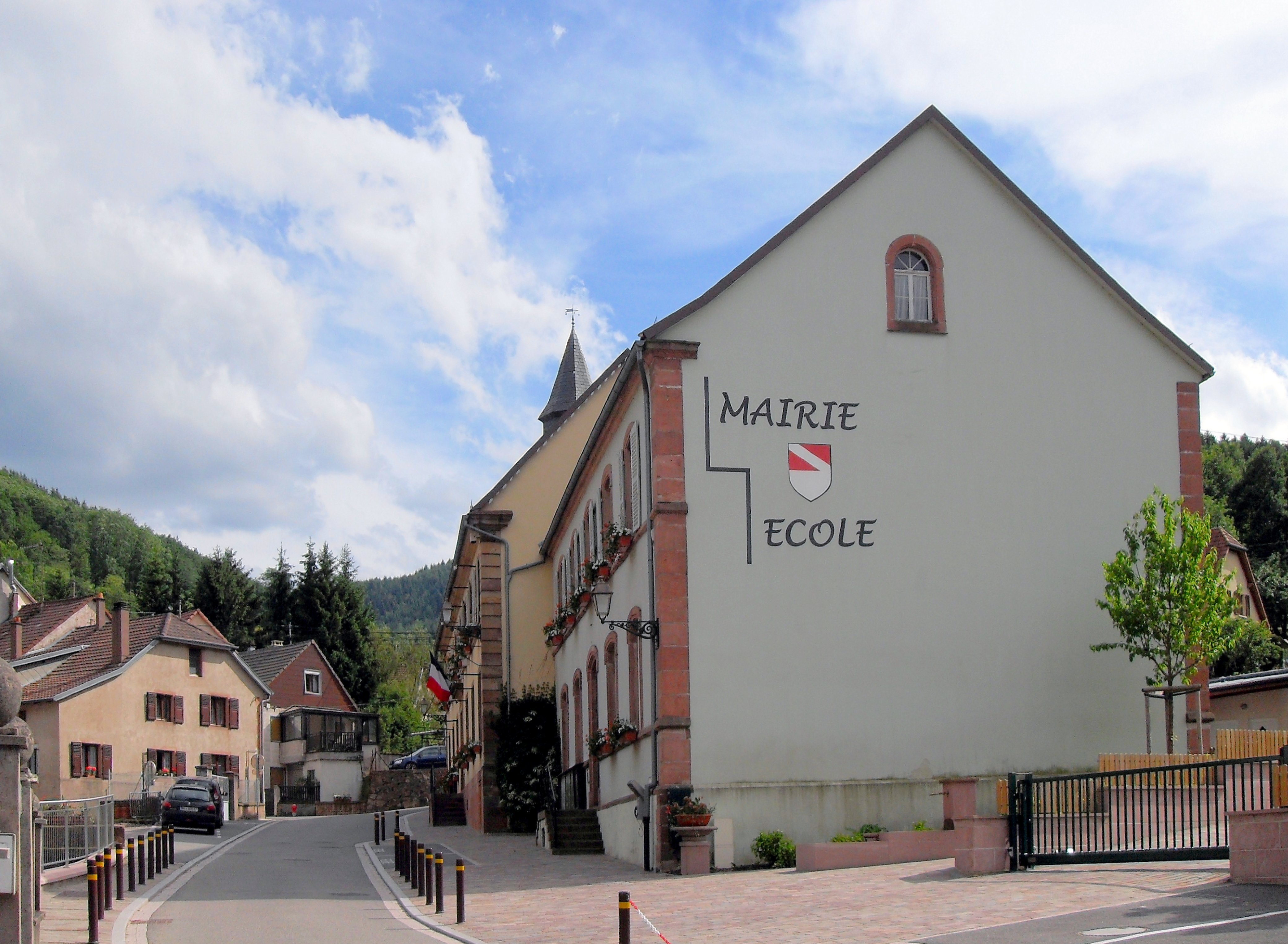 La mairie-école de Barembach